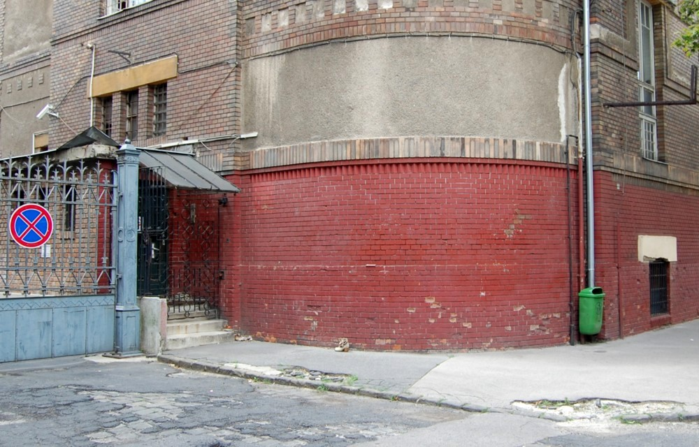 A Fekete Lyuk korábbi bejárata a Golgota utcában.